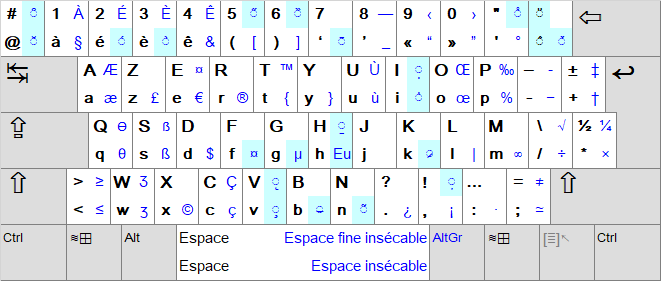 Carte complète de la disposition Azerty, selon la norme NF Z71-300, format png.